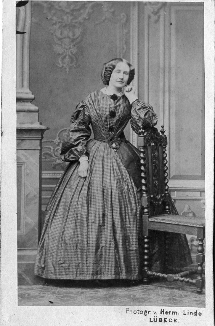 Elise Riemann geb. Koch (1835–1904), Ehefrau des Mathematikers Bernhard Riemann